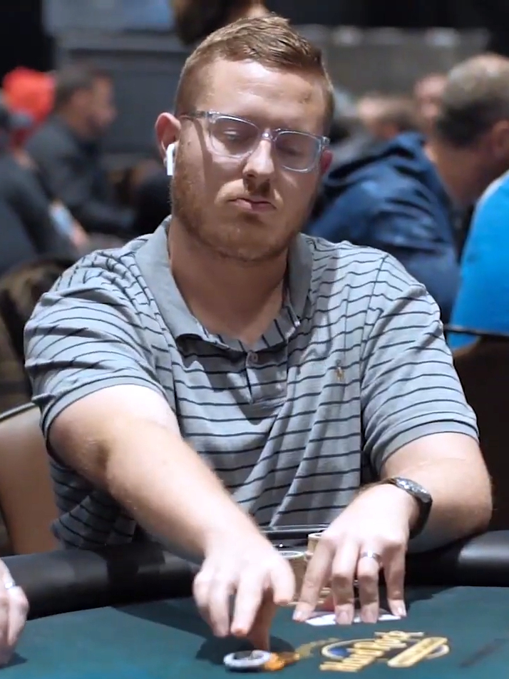 Brian Hastings bei den Lucky Hearts Poker Open